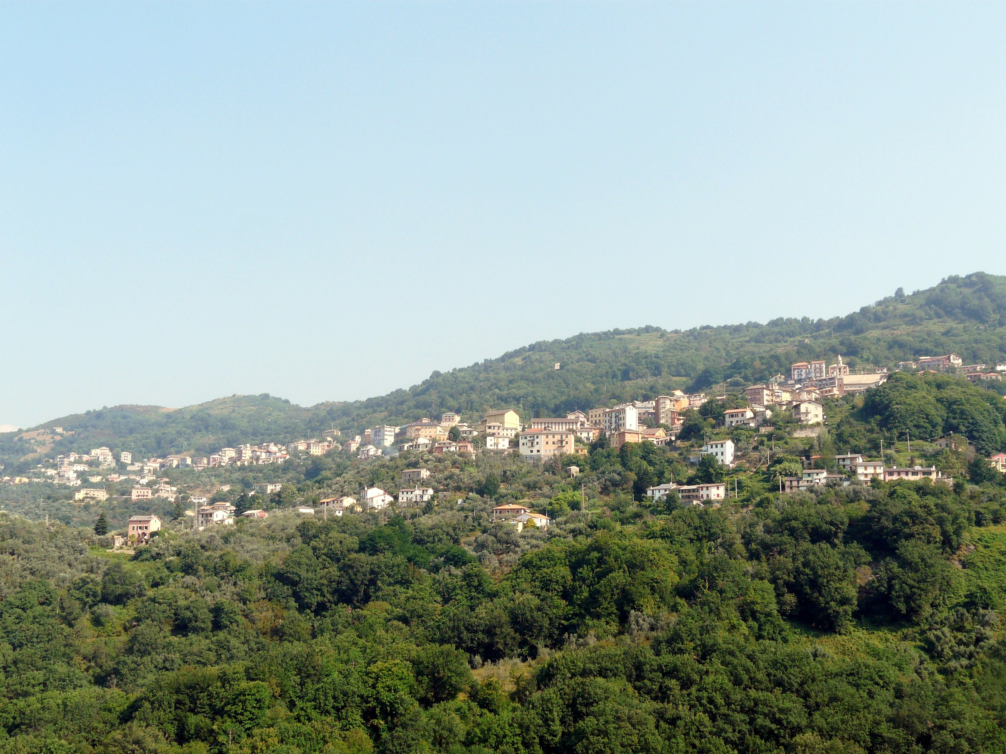 Panorama di Uscio, Liguria, Italia